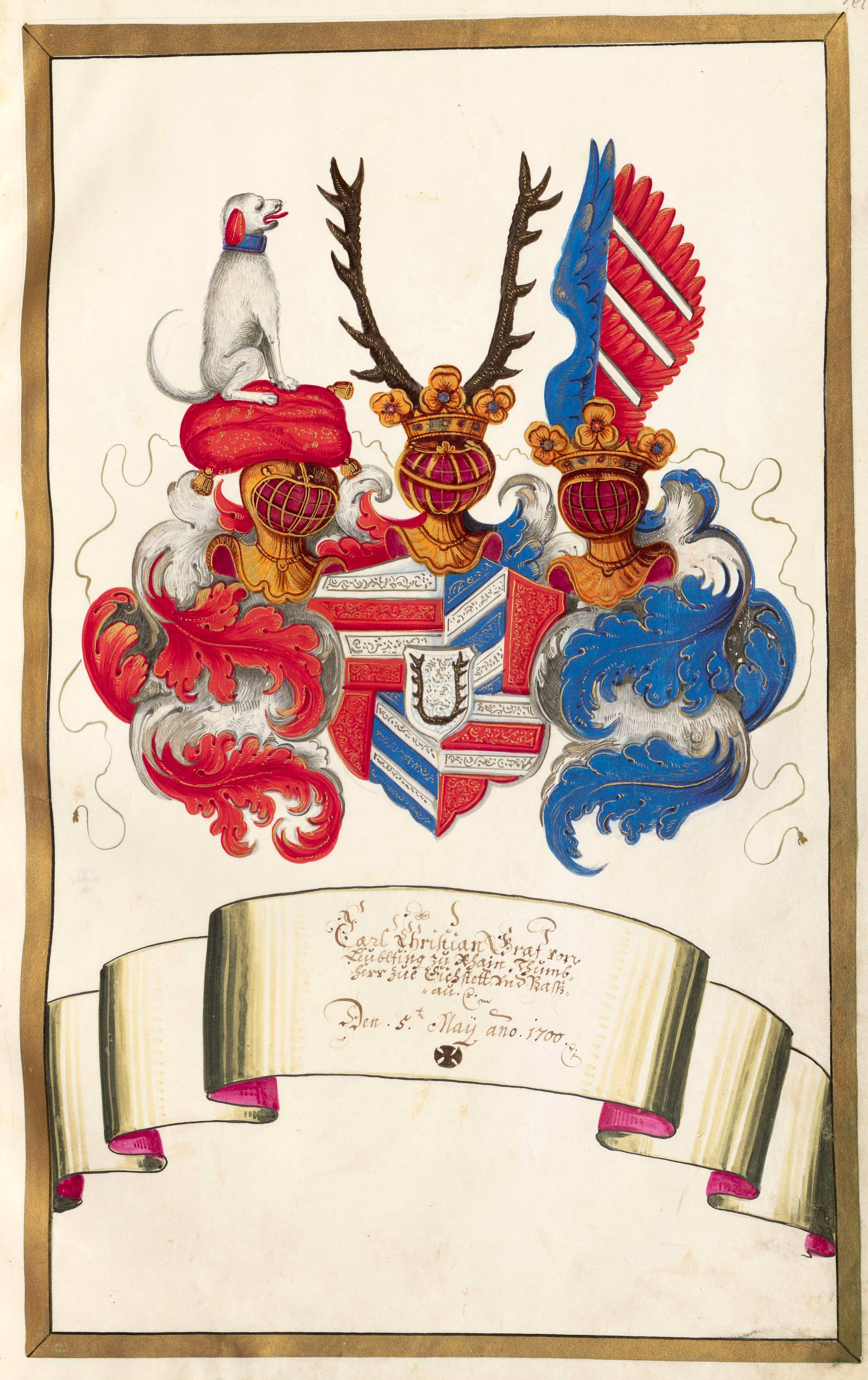 Seite aus dem Mitgliederverzeichnis der Todesangstbruderschaft an der Passauer Jesuitenkirche - Staatliche Bibliothek Passau Ms. 107 a, [S.l.], 1738 [SPA-Hss Ms. 107 a] Wappen Carl Christian Graf von Leublfing zu Rhain, Thumb-Herr zue Eichstett vnd Passau. Den 5t May anno 1700